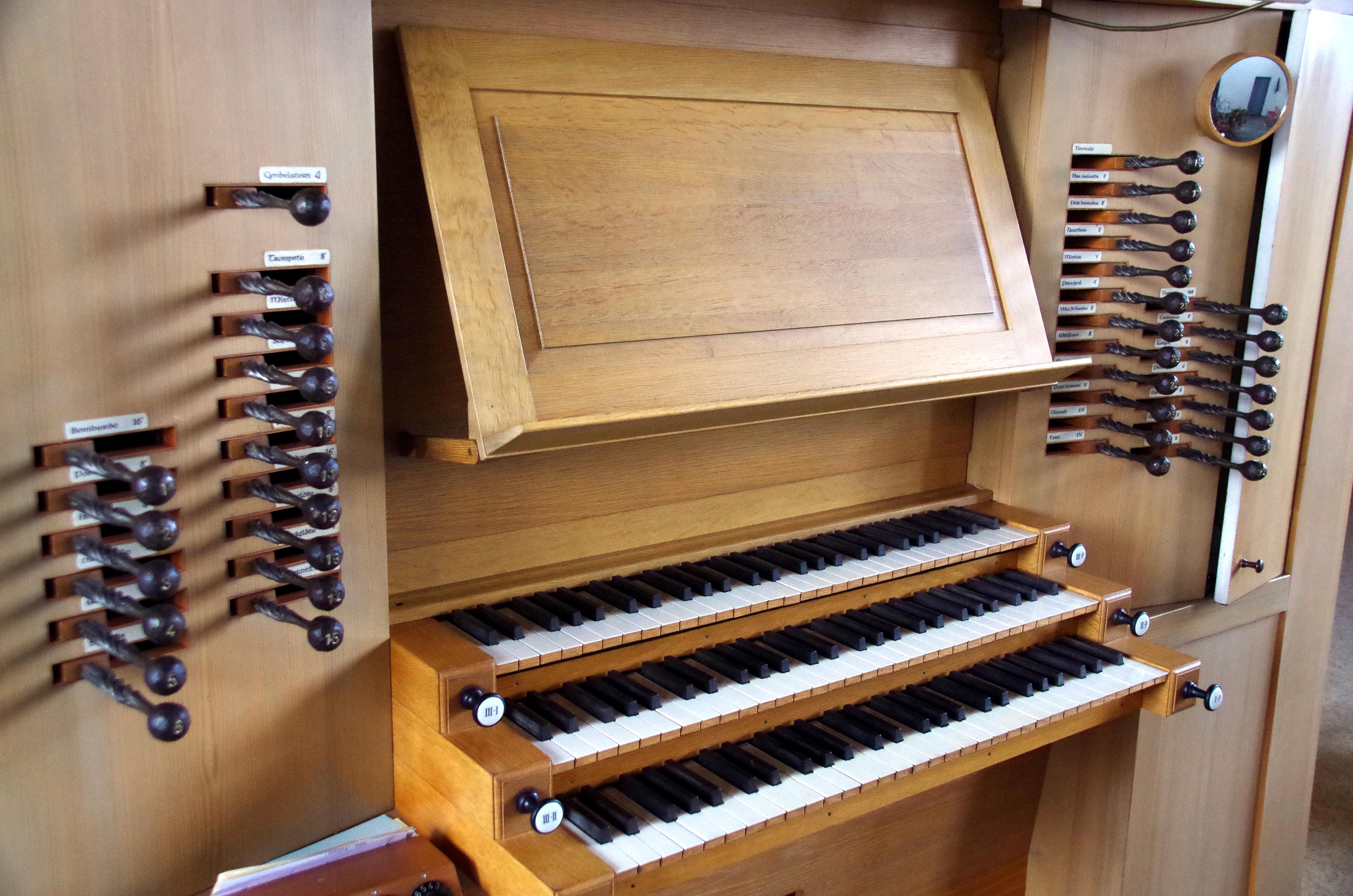 St. Anna (Hellenthal), Spieltisch der Weimbsorgel